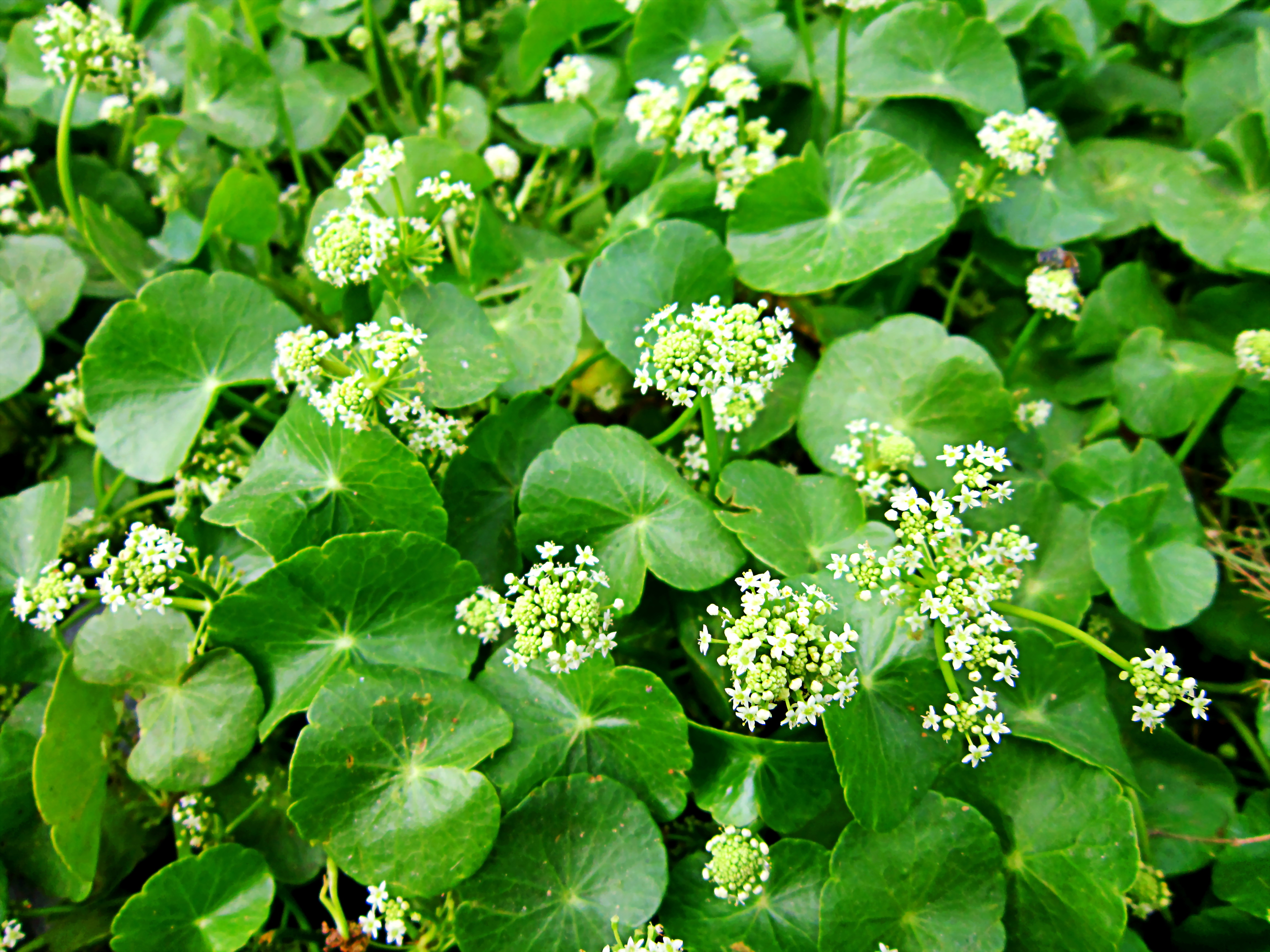 Hoa và lá rau má ở Thốt Nốt (Cần Thơ, Việt Nam).